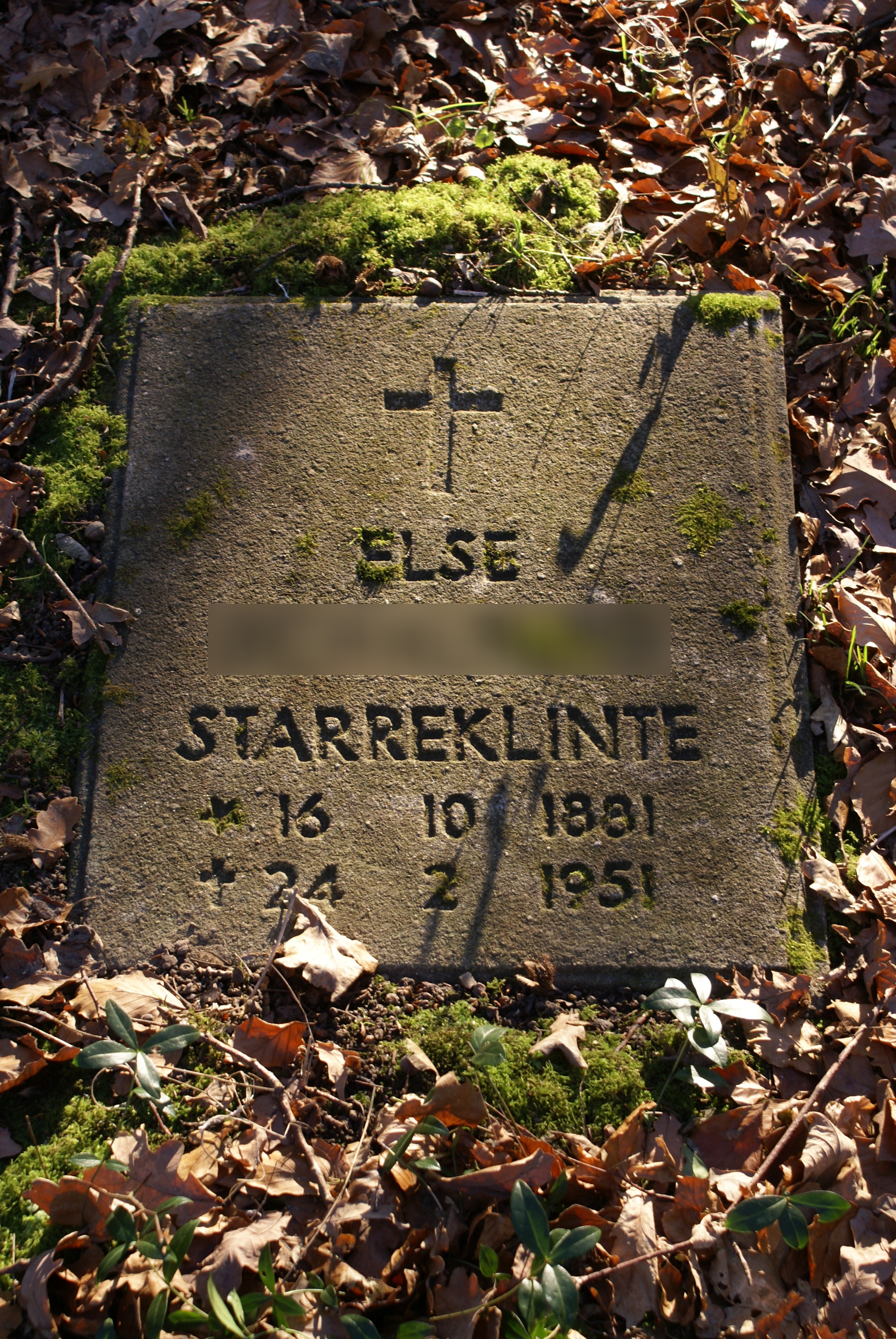 Gravsten på 'de hjerneløses kirkegård'.